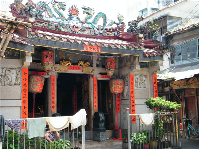 达濠厂前街关爷宫 2009.7.29